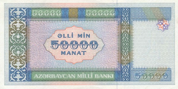 50.000 manat